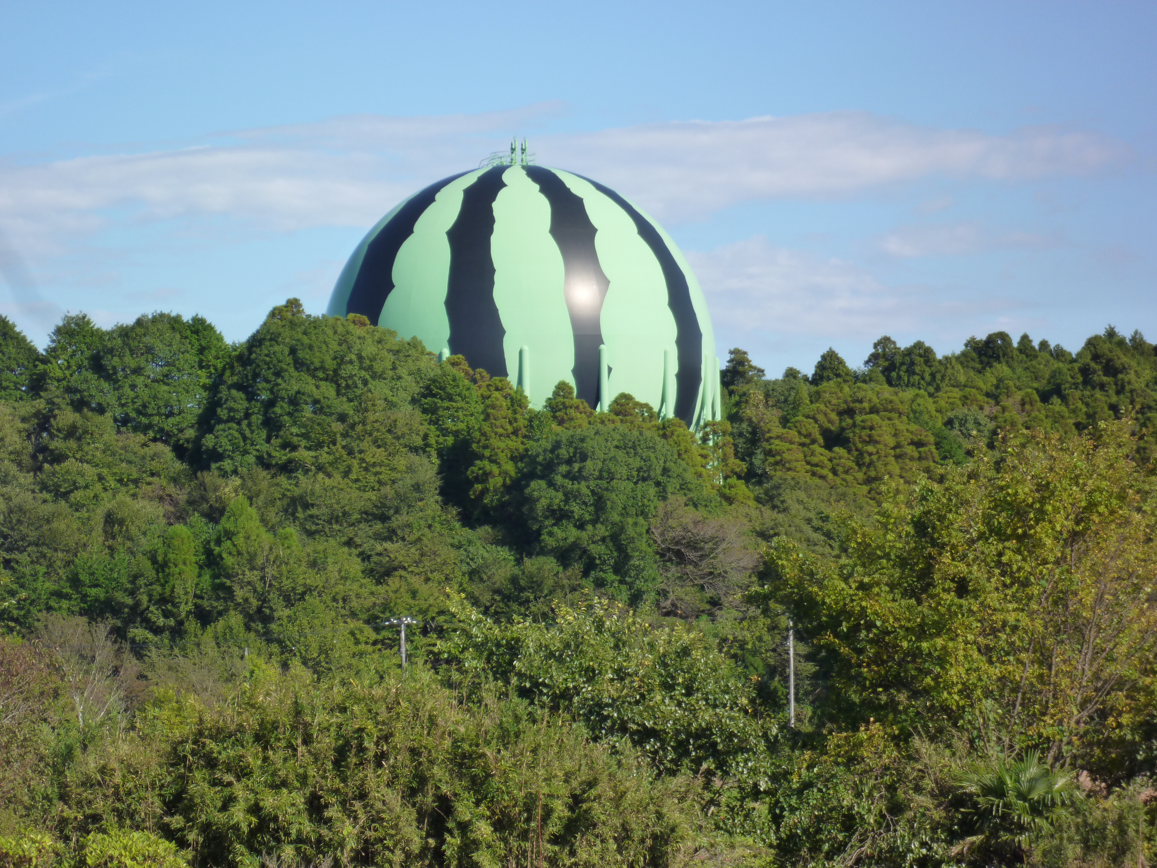 富里市のスイカ柄のガスタンク